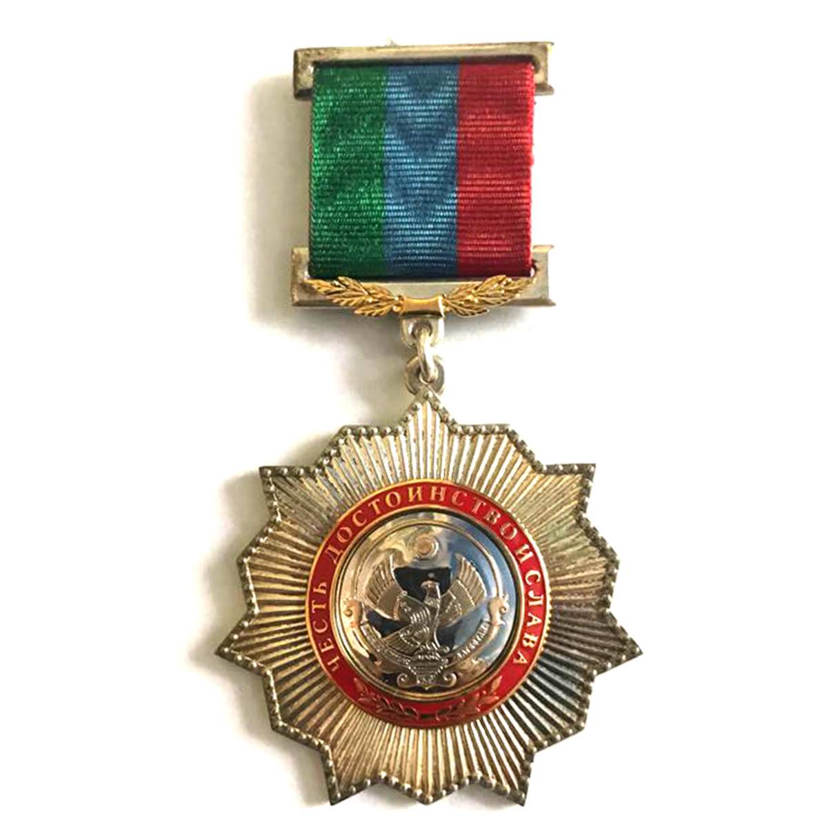 17.09.2009 Муфтий Дагестана шейх Ахмад-Аафнди был награждён орденом «За заслуги перед Республикой Дагестан»